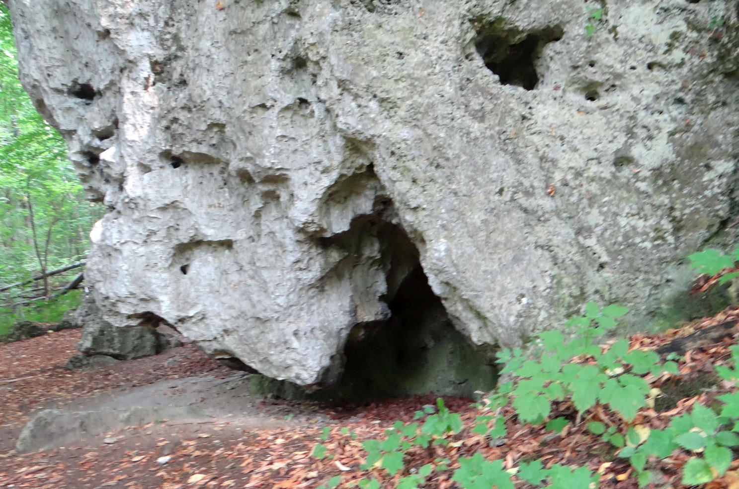 Schronisko w Górze Smoleń VI w Parku Jurajskim